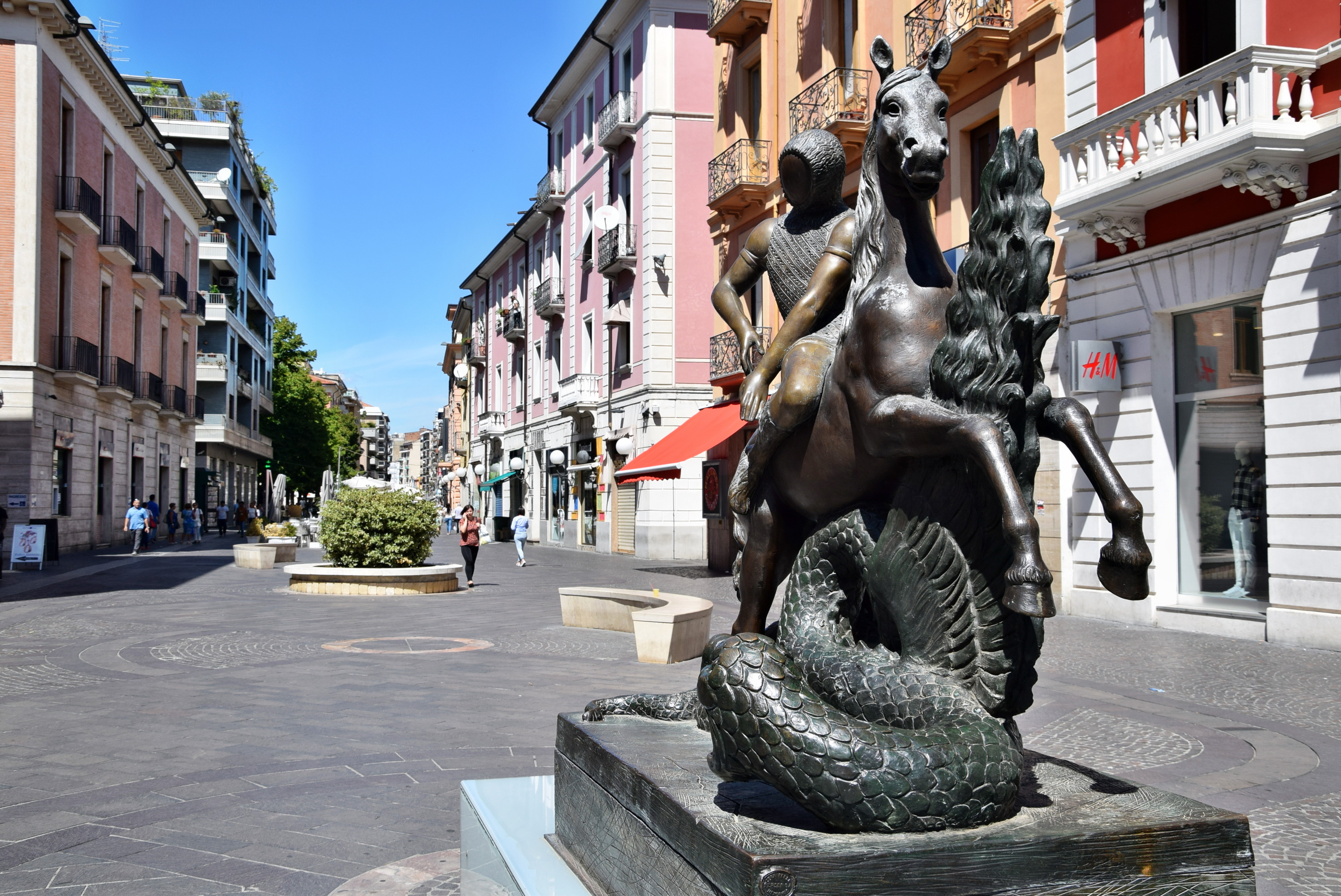 Opera di Salvador Dalì,lega di bronzo,lega di ottone,realizzata nel 1977. This is a photo of a monument which is part of cultural heritage of Italy.